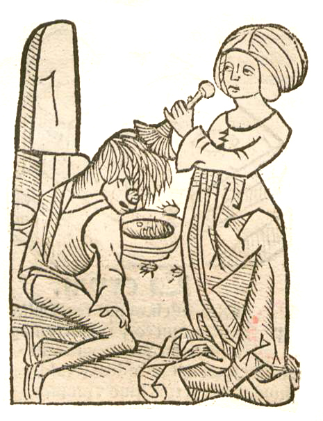 Abbildung zum Kapitel Pediculus - Laus